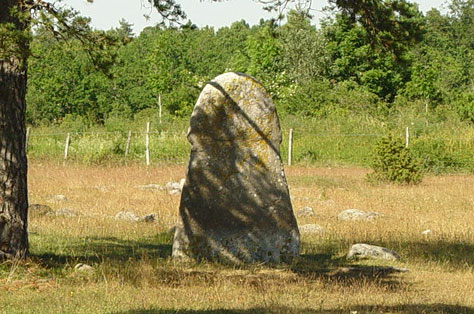 Gotland, Grabstätte Gålrum (über 100 Gräber, Ort:Gemeinde Alskog). Bildstein (8.Jh) stammt von einem anderen Platz